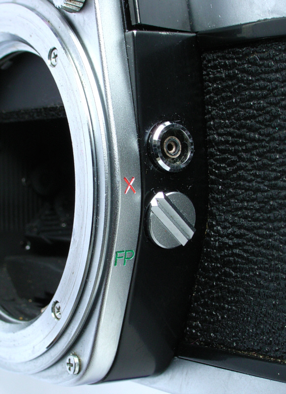 Blitzanschluss einer Kleinbild-Spiegelreflexkamera (Minolta SRT 303b) mit Umschalter zwischen X- und FP-Synchronisation